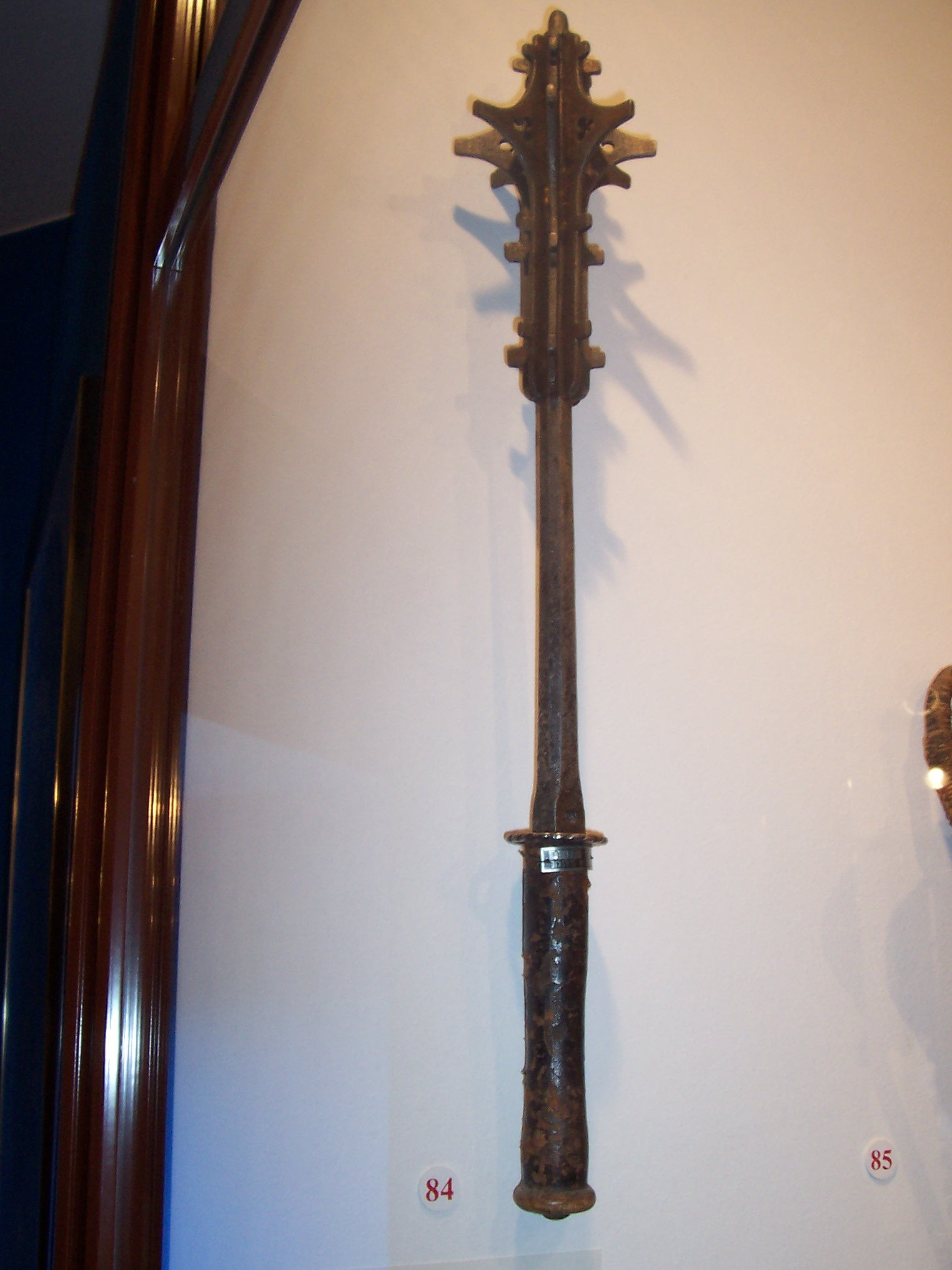 Buzdygan ze zbiorow na zamku w Malborku author: user:Palladinus